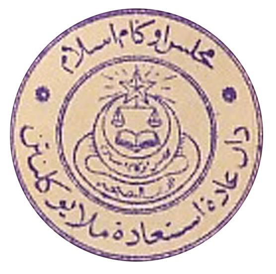 Logo lama MAIK (kedua)